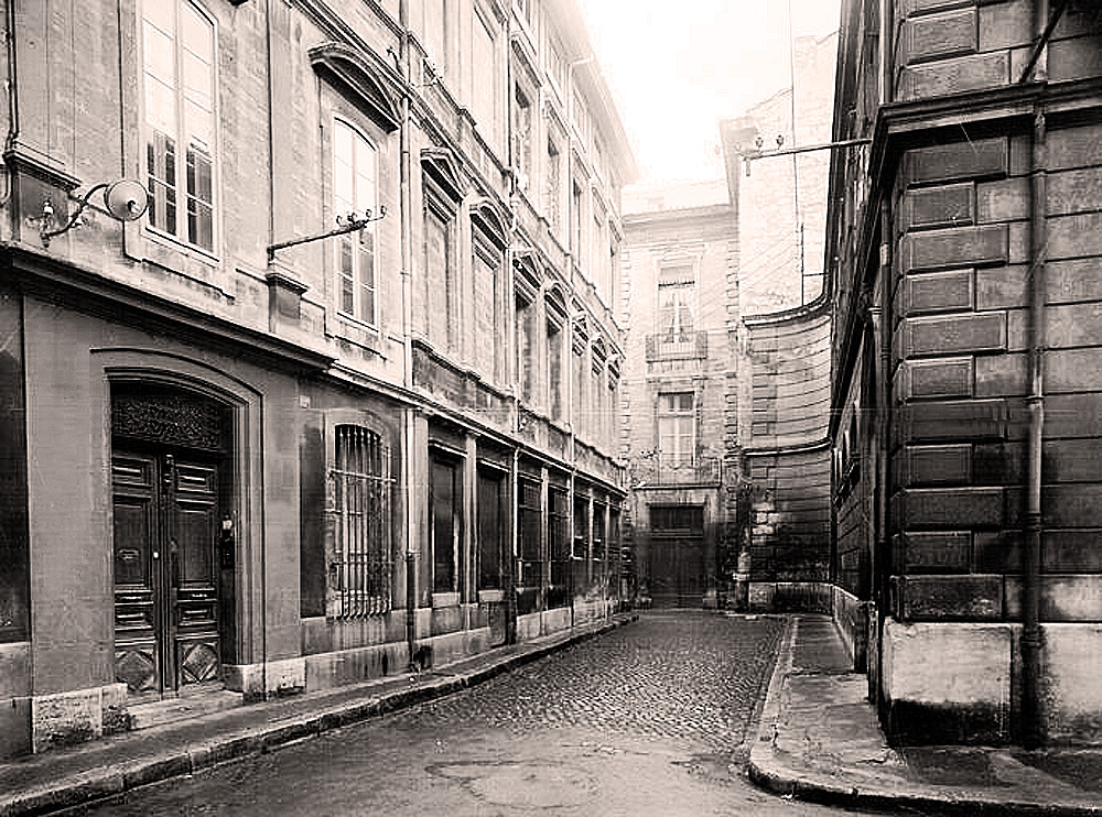 Rue de roi René